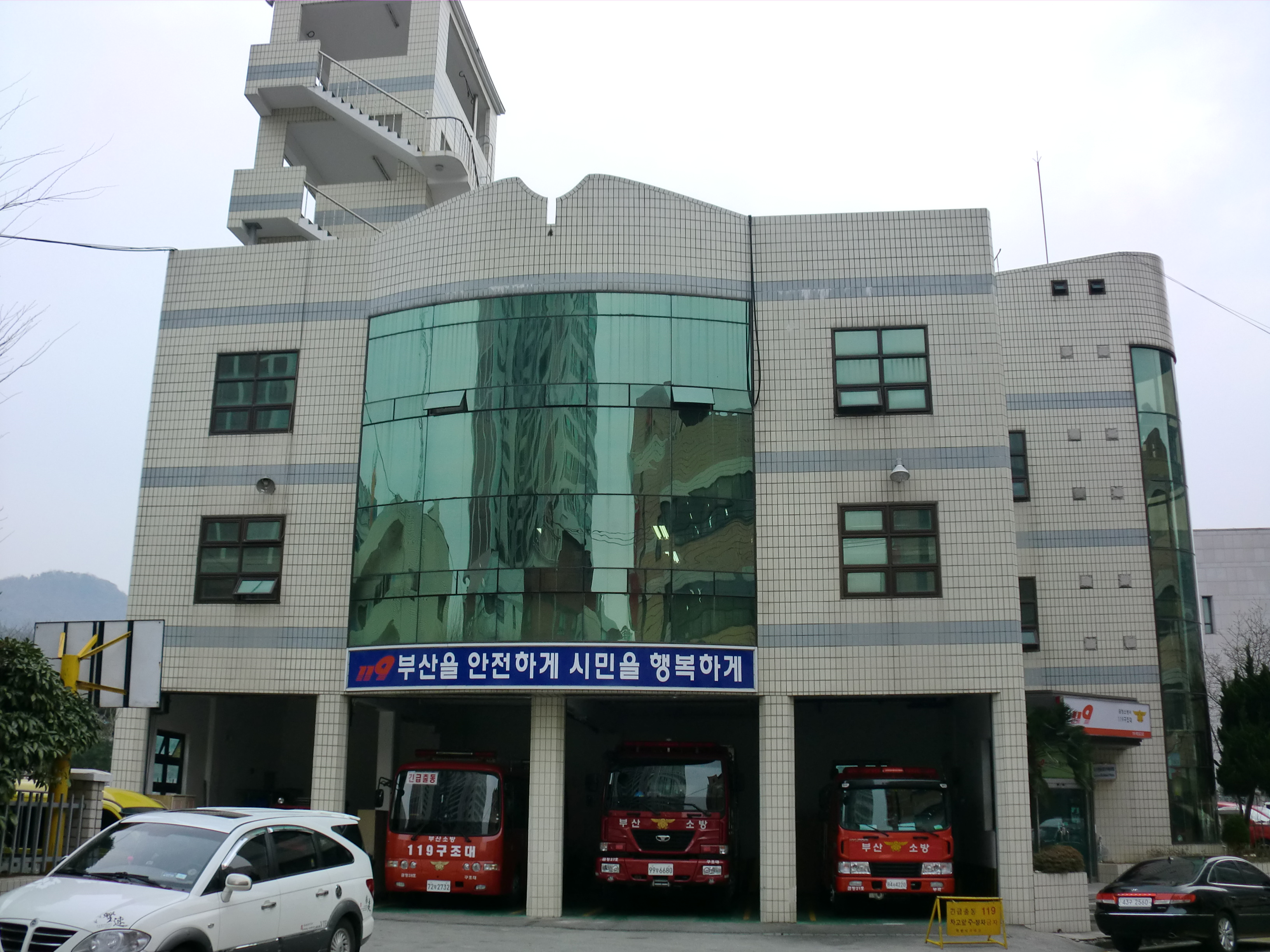 부산광역시 금정구에 있는 금정소방서 119구조대